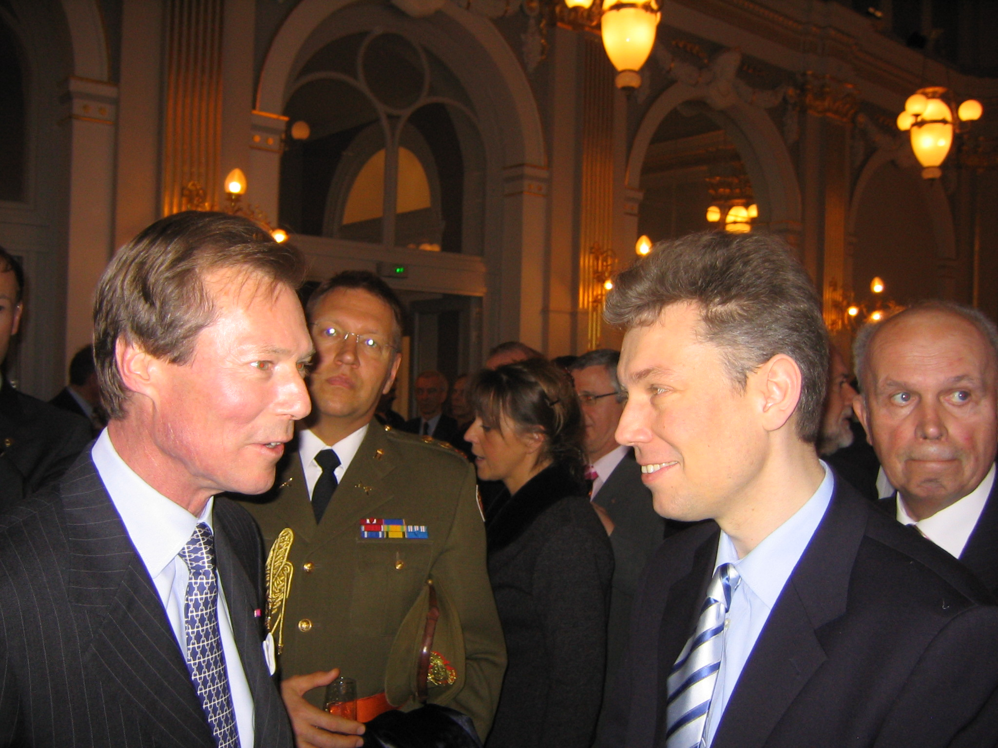 SAR Grand-Duc Henri mam Jérôme Lulling op der Universitéit Namouer Mäerz 2007 Kee Copyright, Privatarchiv Jérôme Lulling